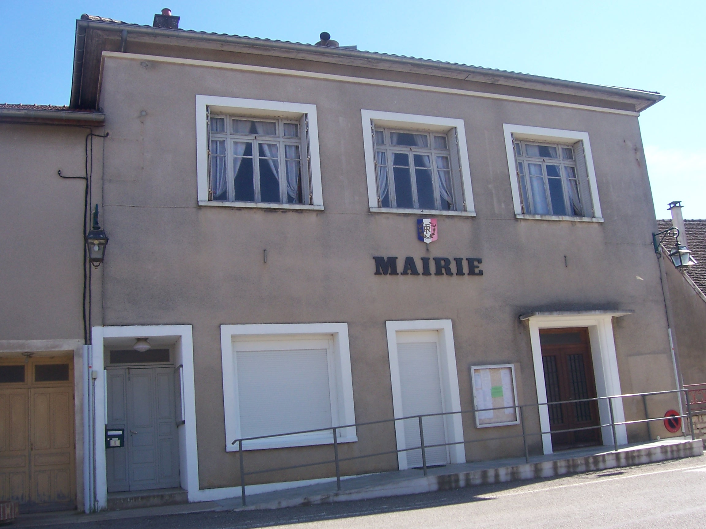 Mairie de Lessard-en-Bresse